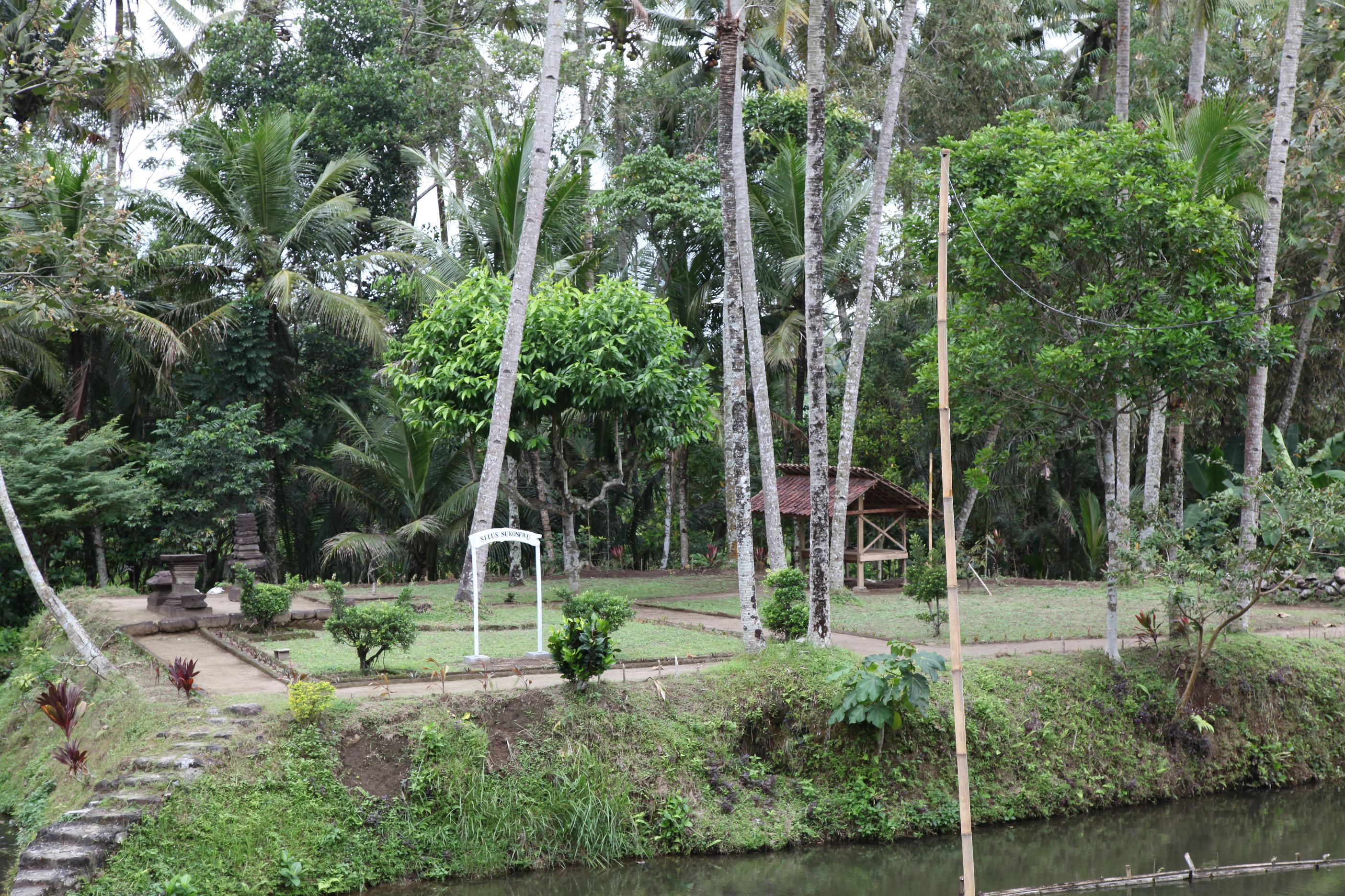 Situs Sukosewu (Sukosewu Temple)